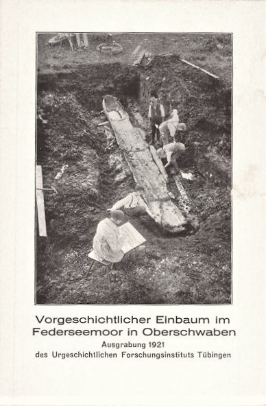 Vorchristlicher Einbaum im Federseemoor – Ausgrabung von 1921 des Urgeschichtlichen Forschungsinstituts der Universität Tübingen. Postkarte verlegt von Hass & Grabharr.